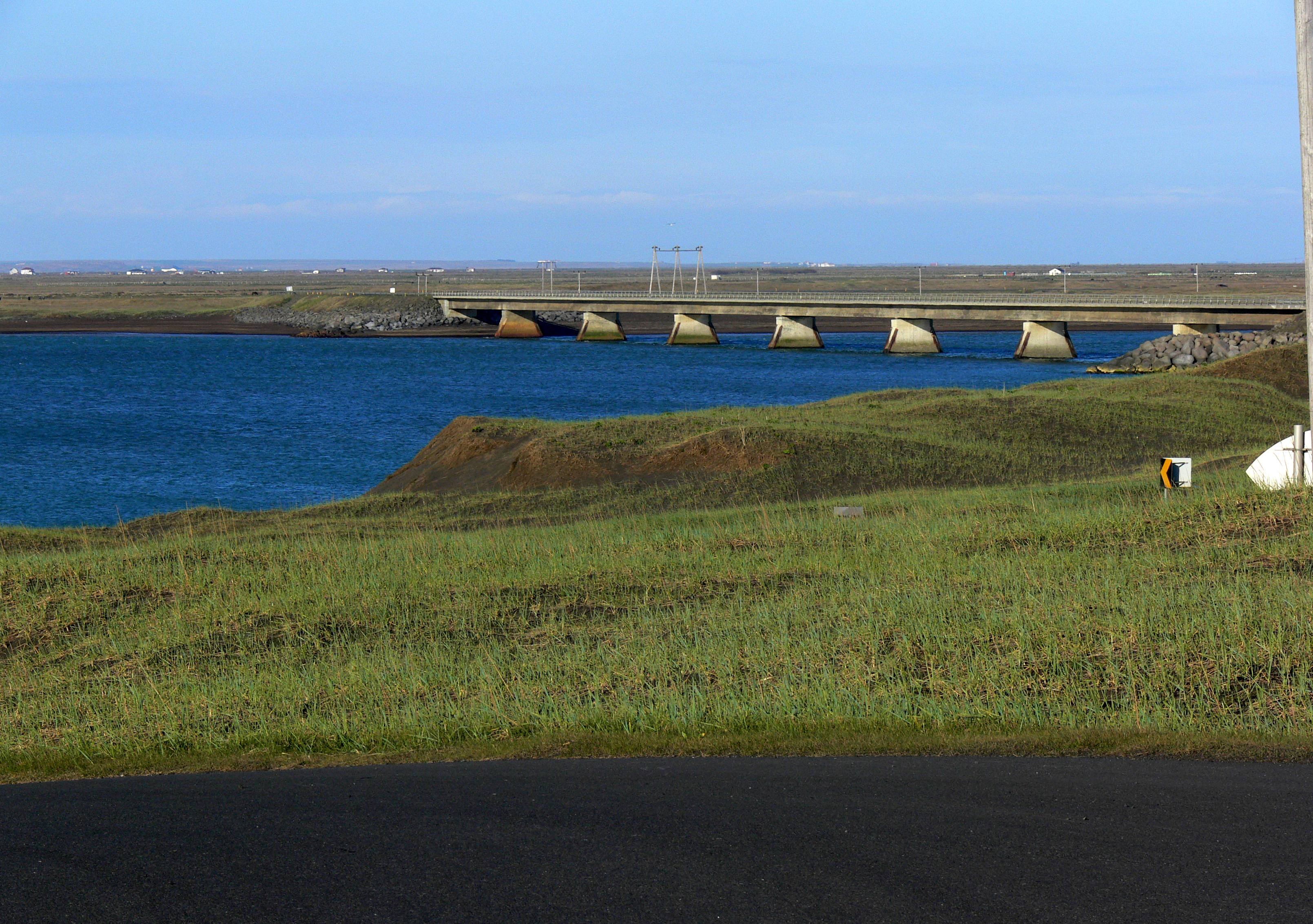 Brücke über die Ölfusá.